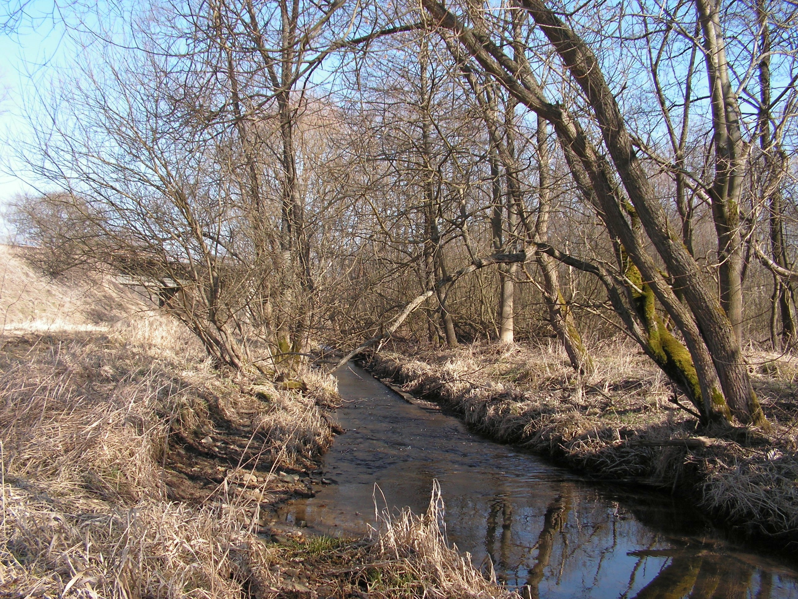 Slubice nedaleko ústí do Chrudimky v okrese Chrudim